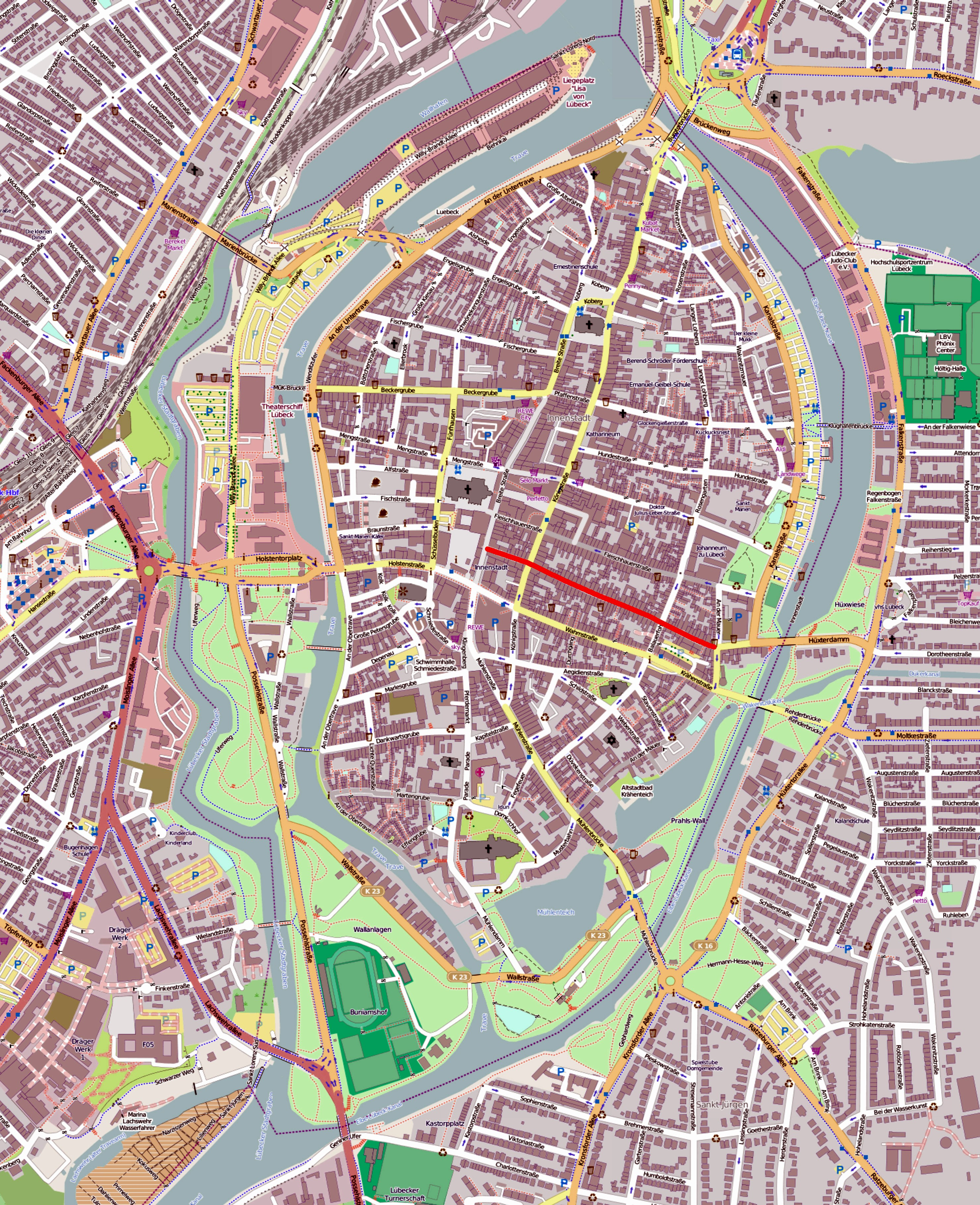 Die Hüxstraße in Lübeck, rot markiert auf einer OpenStreetMap-Karte